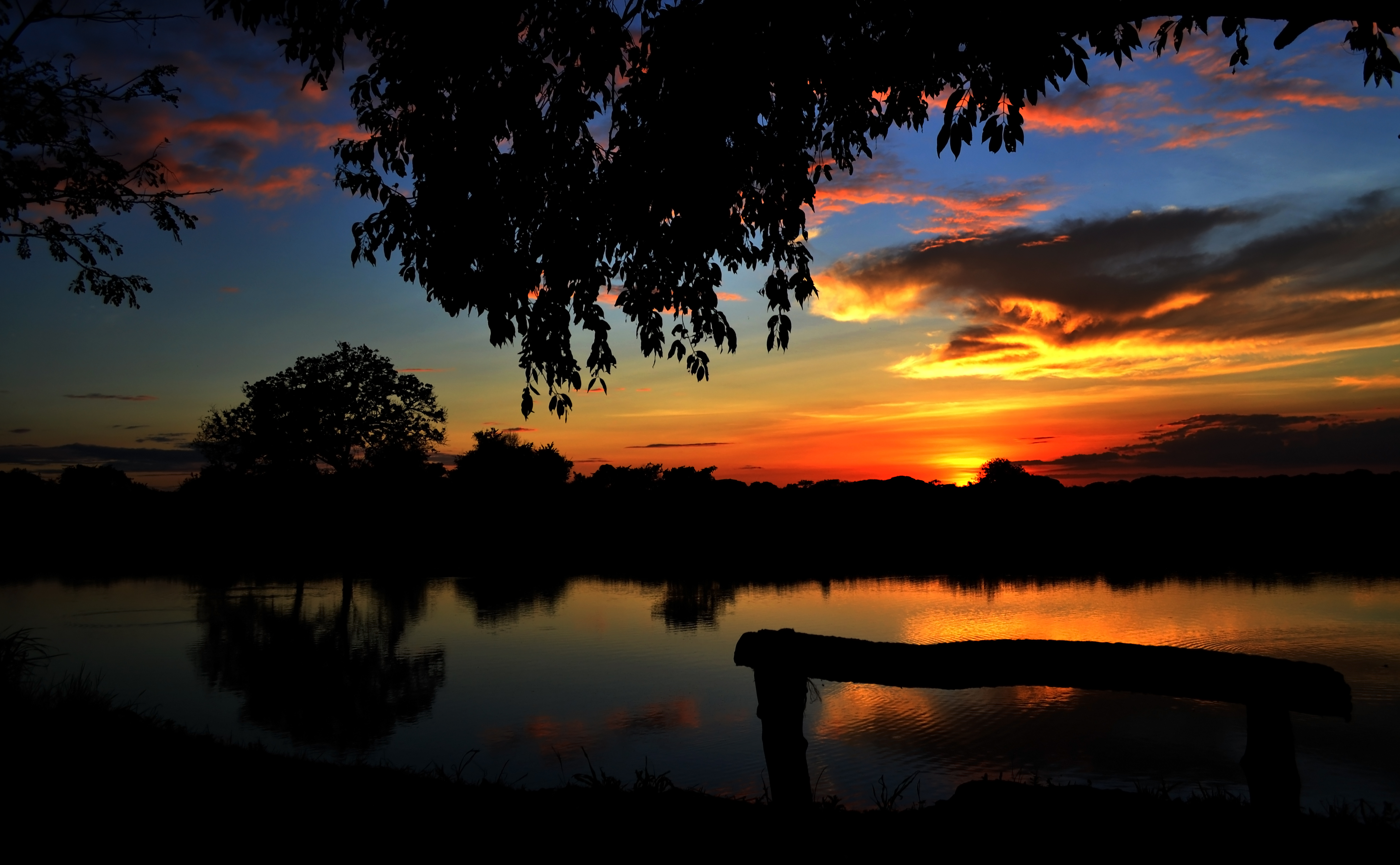 espectacular atardecer en el llano camaguanense del Estado Guárico.